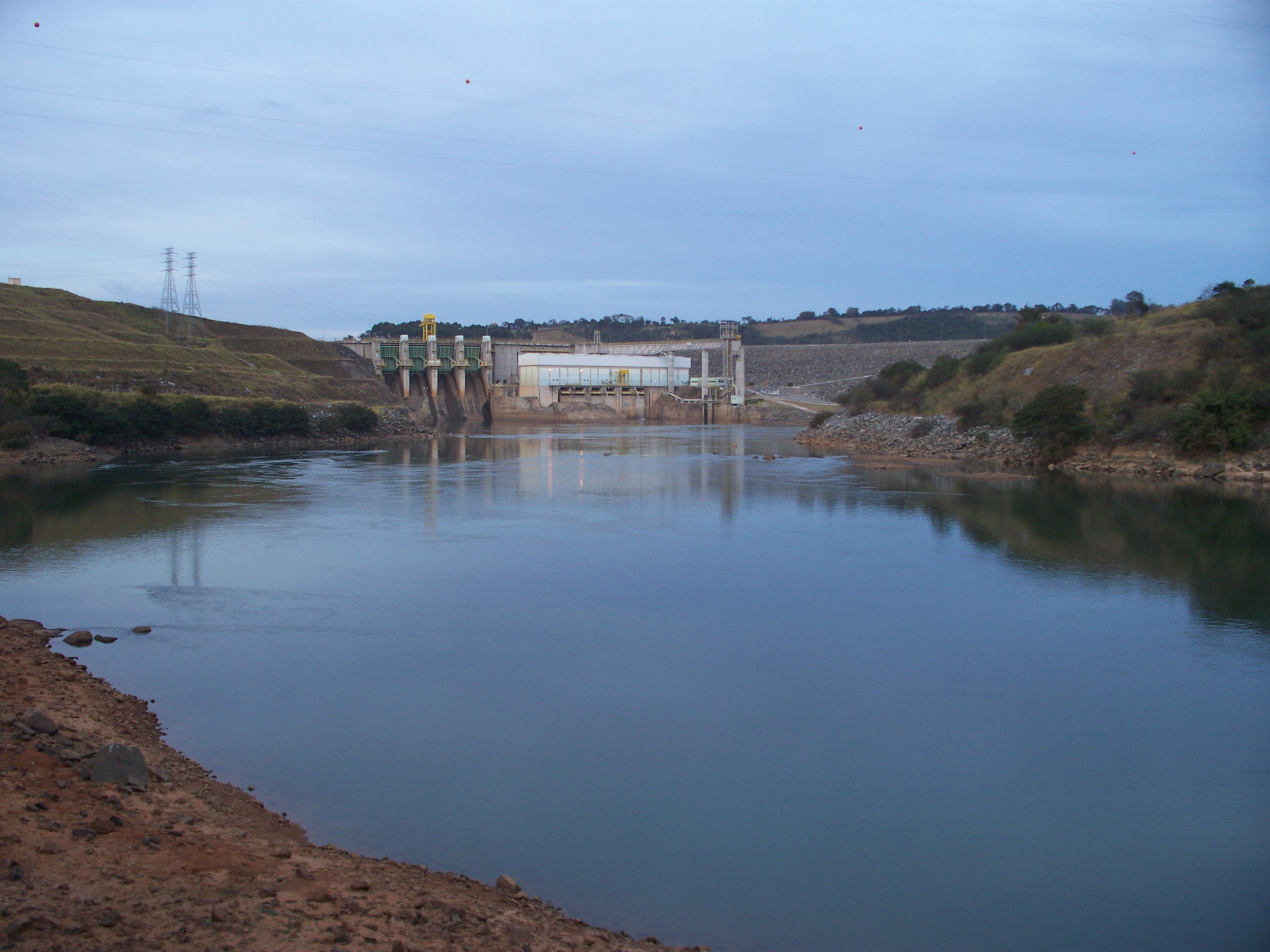 Rio Grande e Usina do Funil